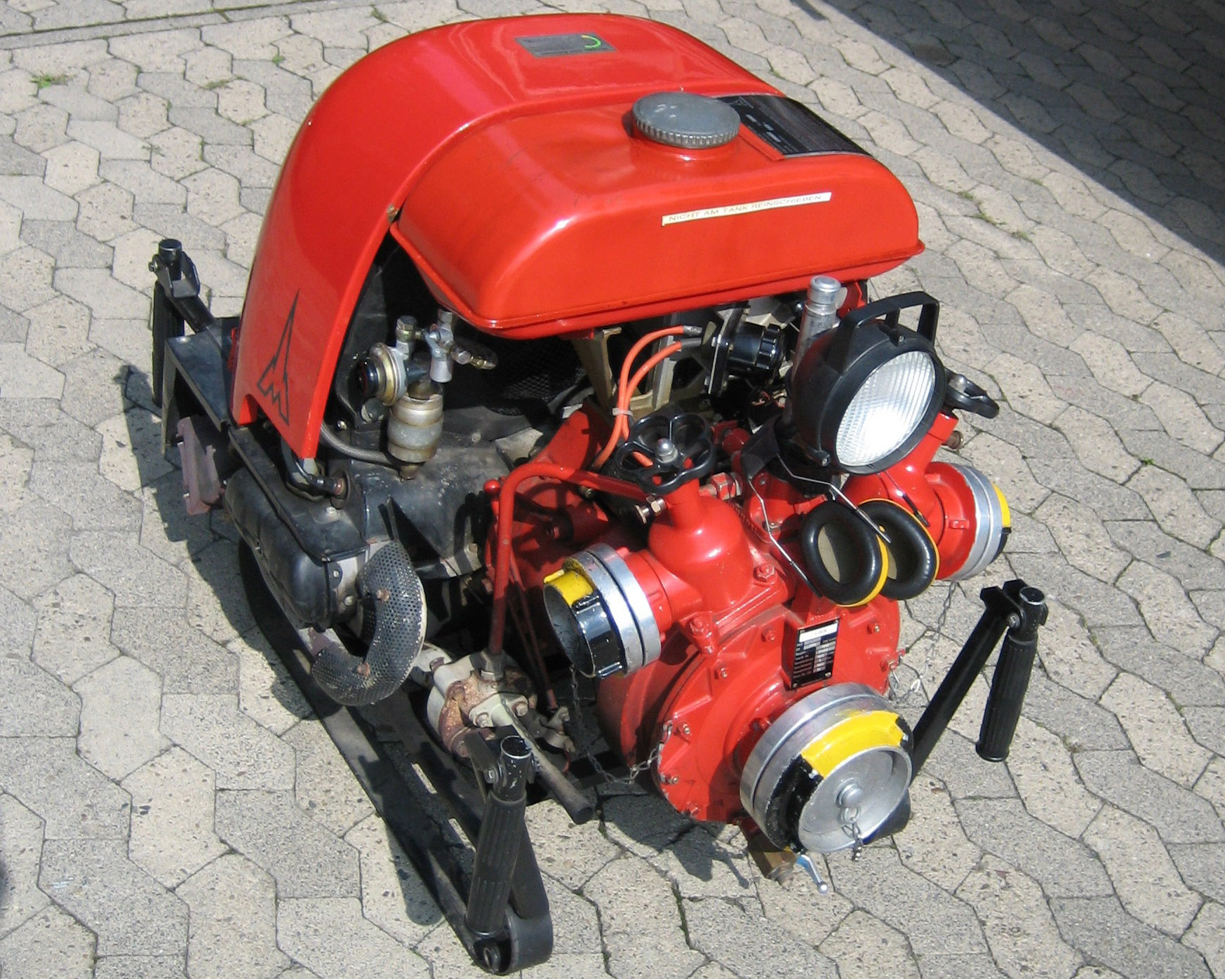 Tragkraftspritze (Motorspritze) welche in den 60er Jahren gebaut wurde und teilweise heute noch eingesetzt wird.